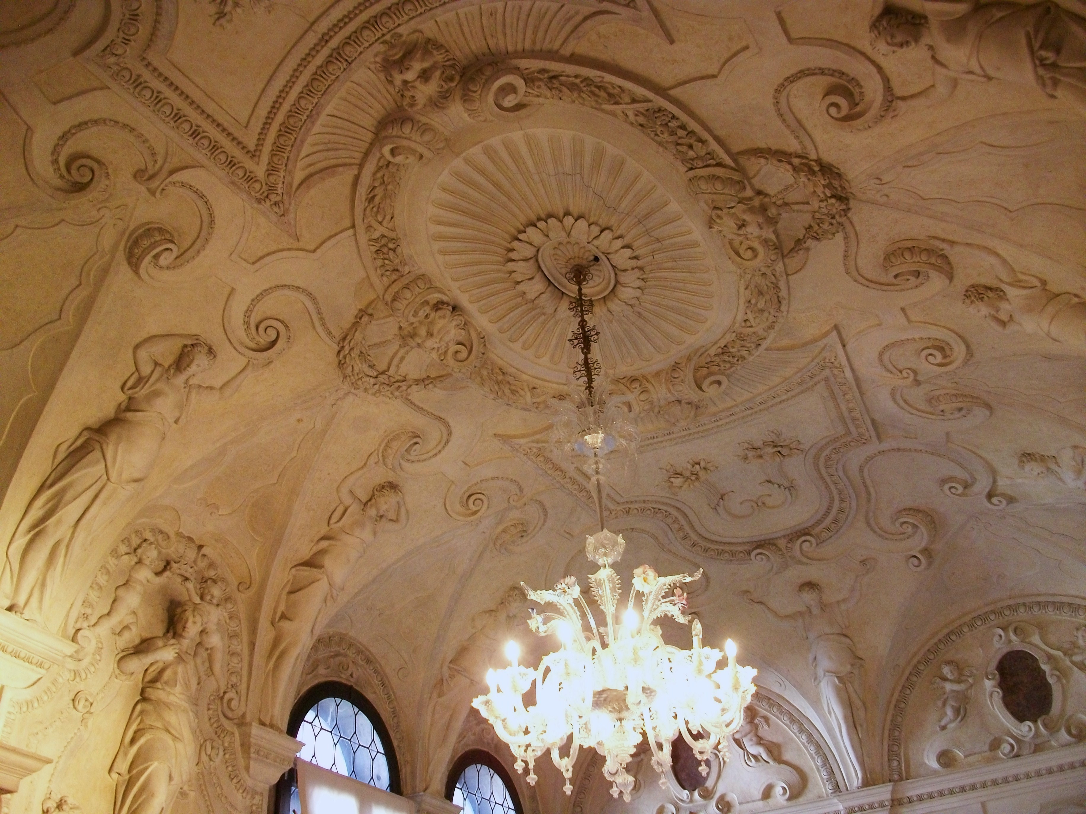 Sala degli Stucchi o Priùli - Palau Ducal de Venècia.